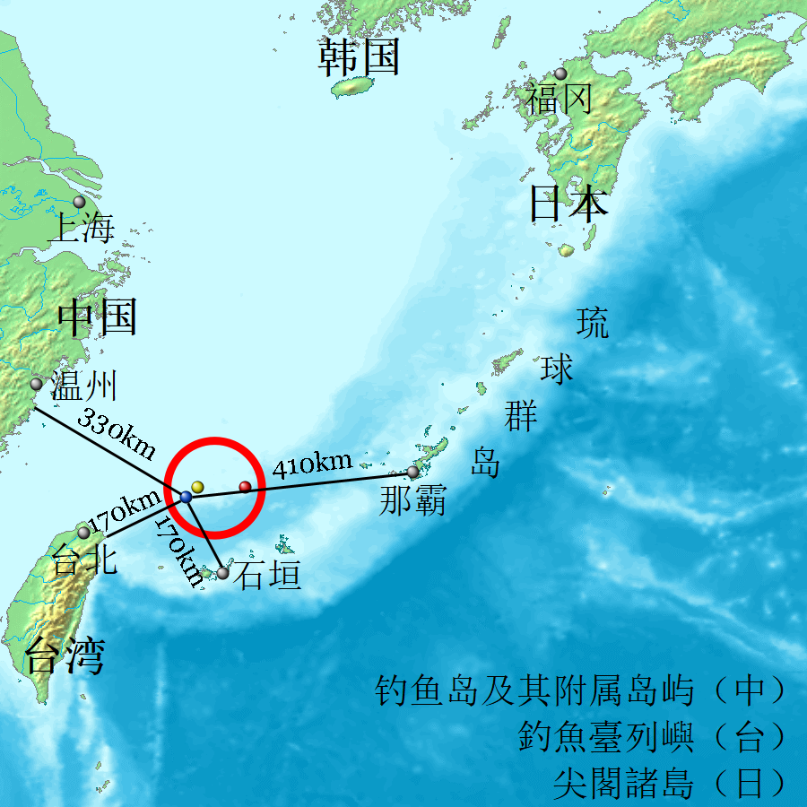 蓝：钓鱼岛；黄：黄尾屿；红：赤尾屿